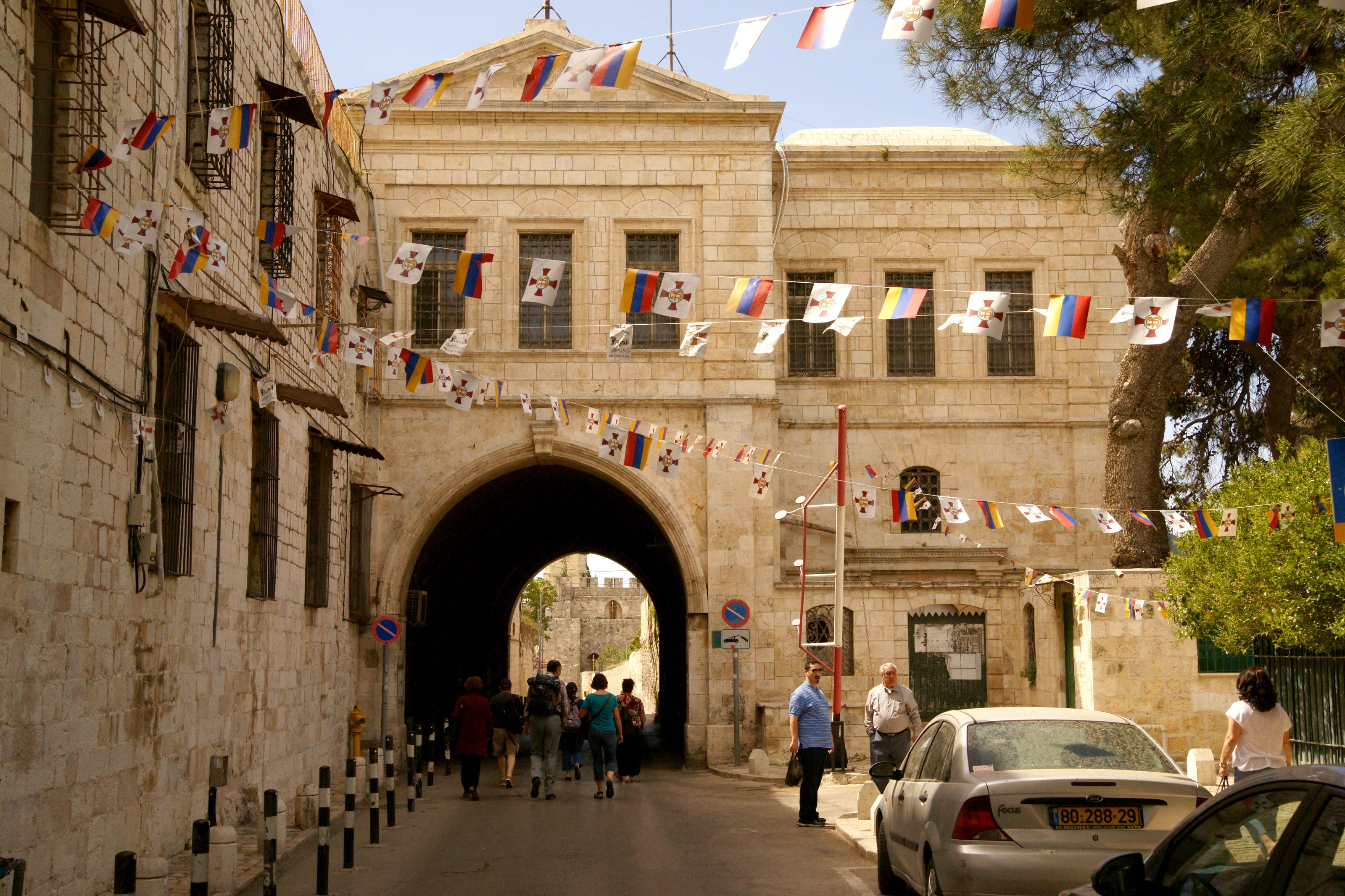 Jakobuskloster und -kathedrale